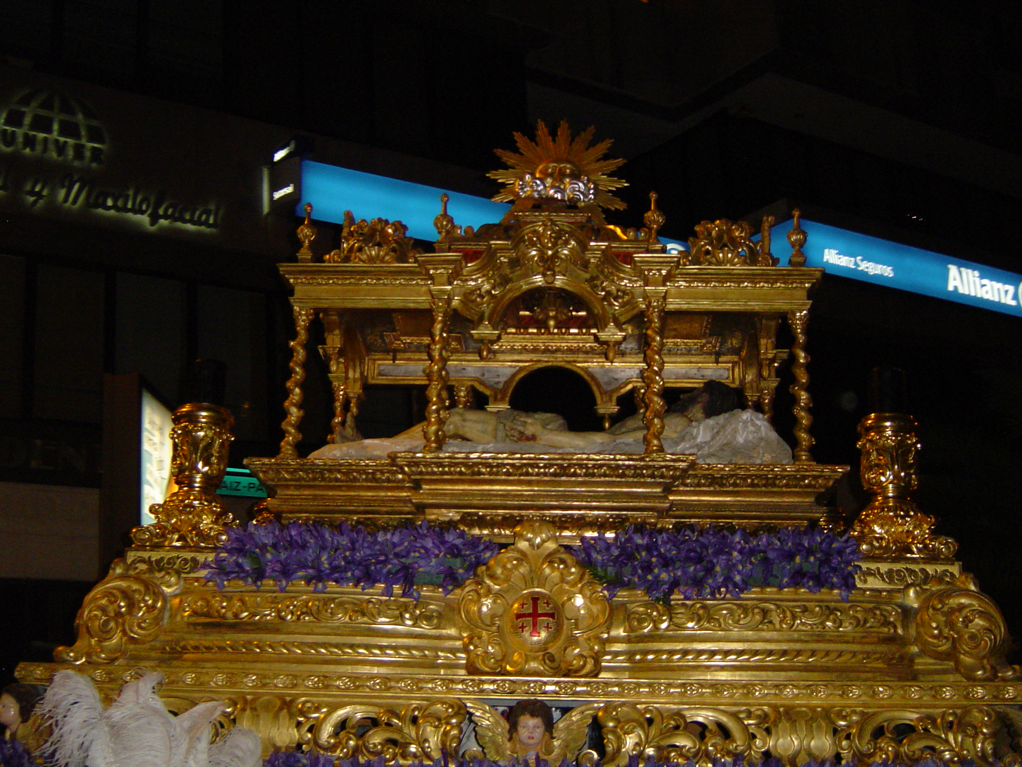 Paso del Santo Sepulcro en la carrera oficial 2008